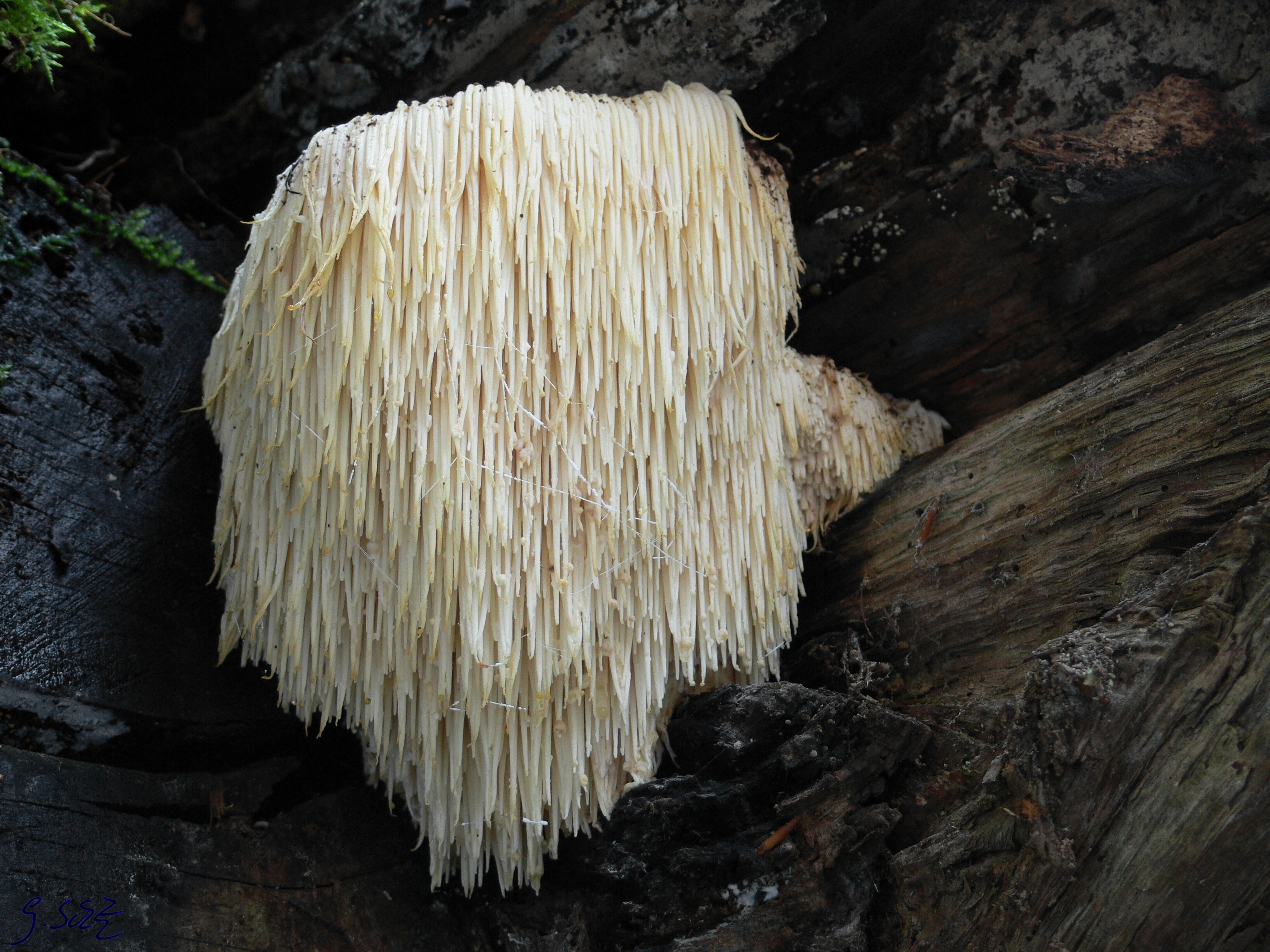 ausgewachsener, sporender Igelstachelbart (Hericium erinaceus) an Rotbuchenstamm